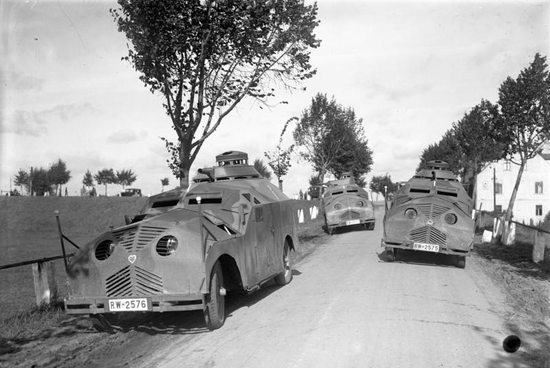 Die grossen Reichswehrmanöver in Frankfurt/Oder, welche im Beisein des Reichspräsidenten von Hindenburg stattfanden ! Panzerwagen-Atrappen aus Blech auf der Landstrasse im Manövergelände. Information added by Wikimedia users."Adler Standard 6 Reichswehr armoured car" (see [1]) ?